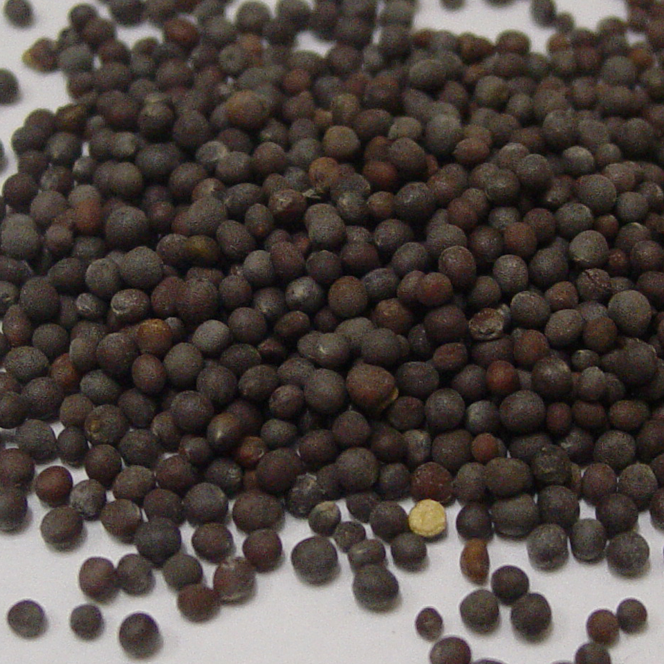 കടുക് താളിനു വേണ്ടി.